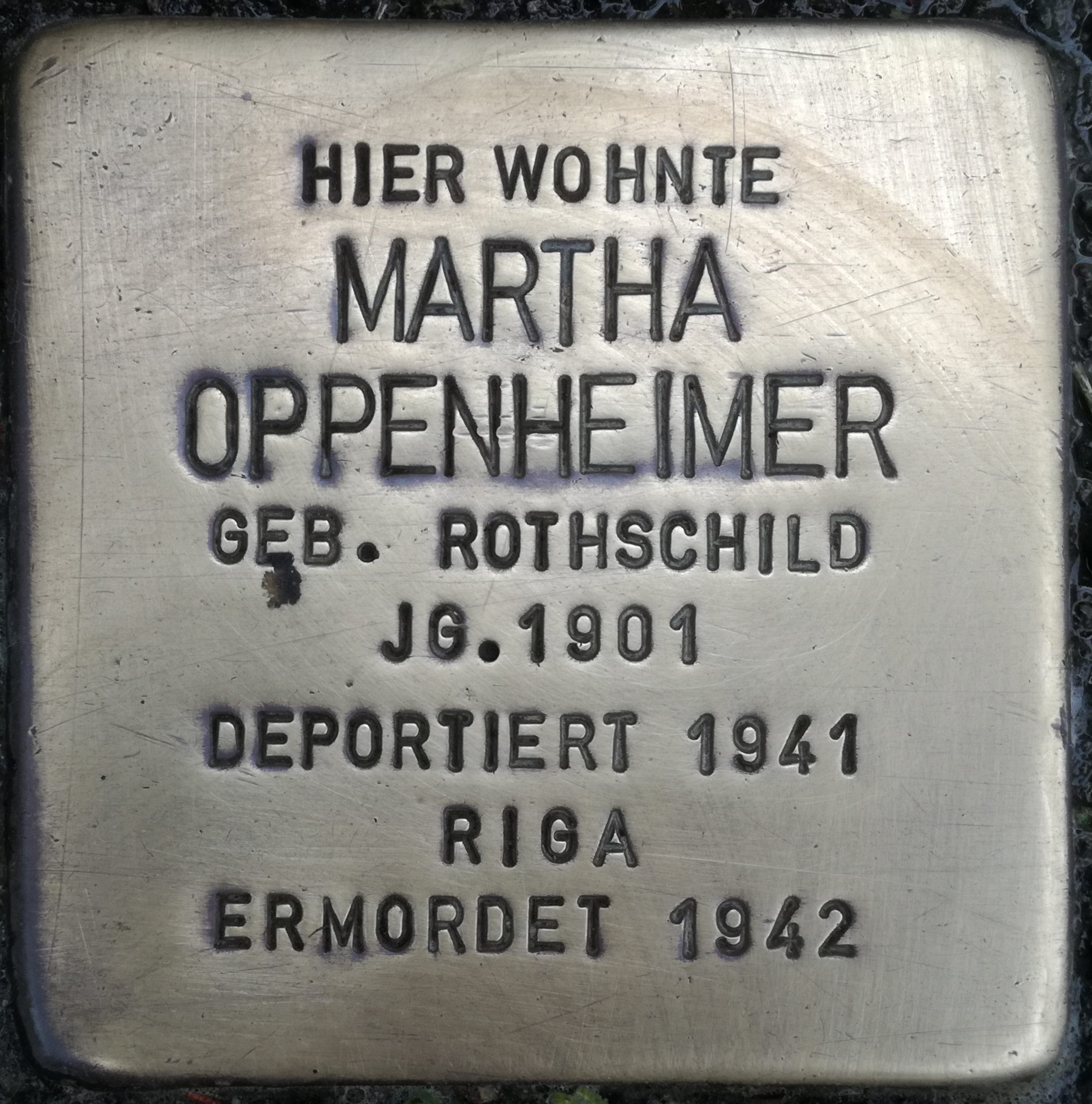 Hier wohnte Martha Oppenheimer geborene Rothschild Jahrgang 1901 deportiert 1941 Riga ermmordet 1942